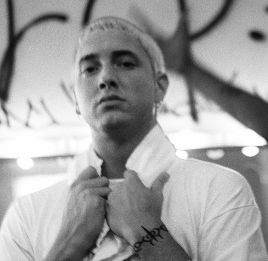 backstage in Munich/Germany 31.10.1999